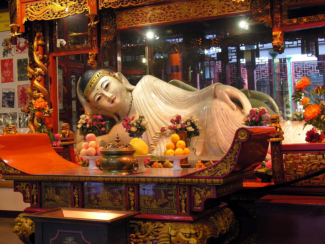 China-8095